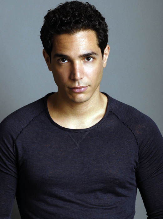 Karim El Kerem en 2012